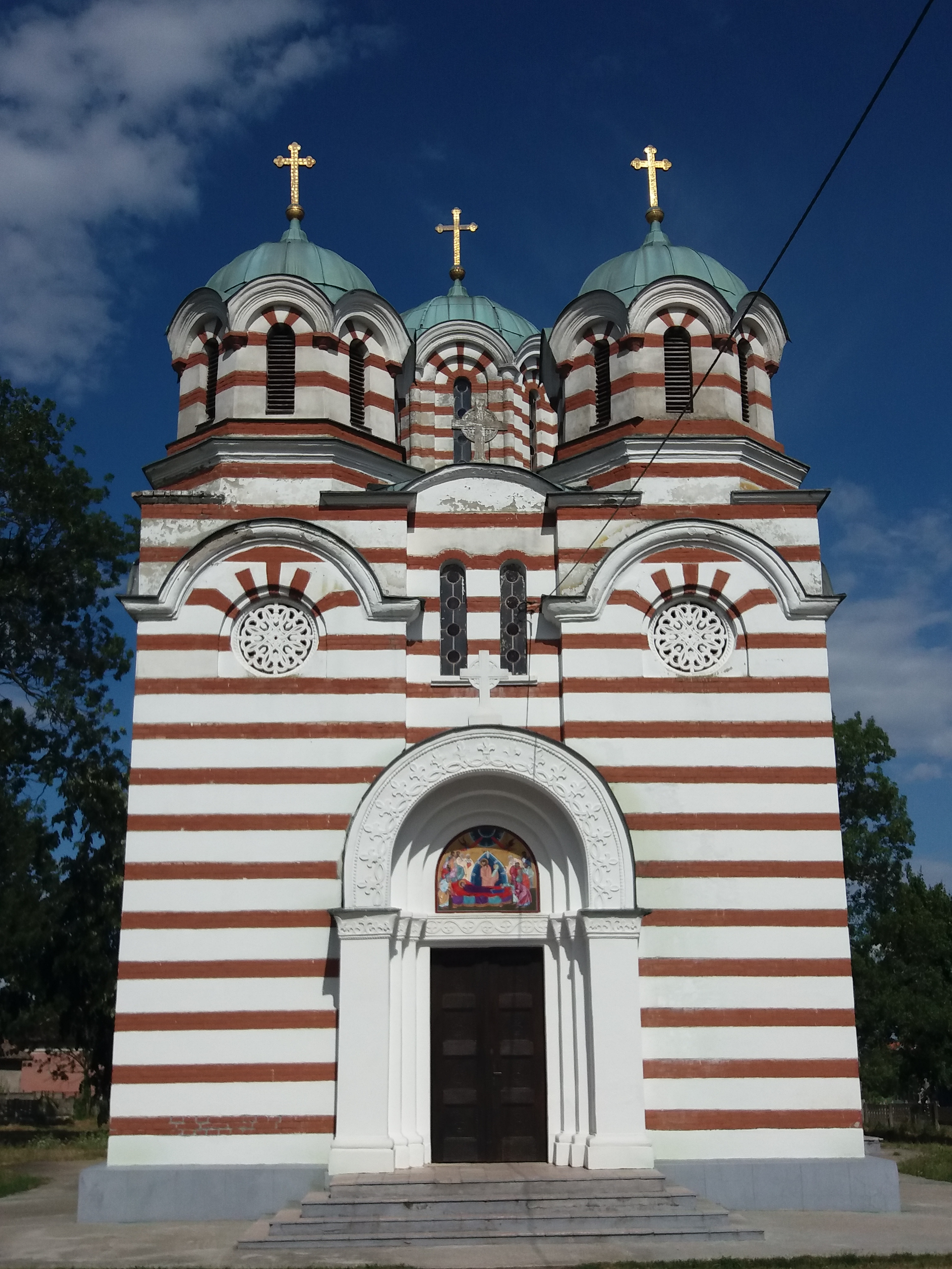 Srpski (latinica): Crkva Uspenja Presvete Bogorodice, Ratari